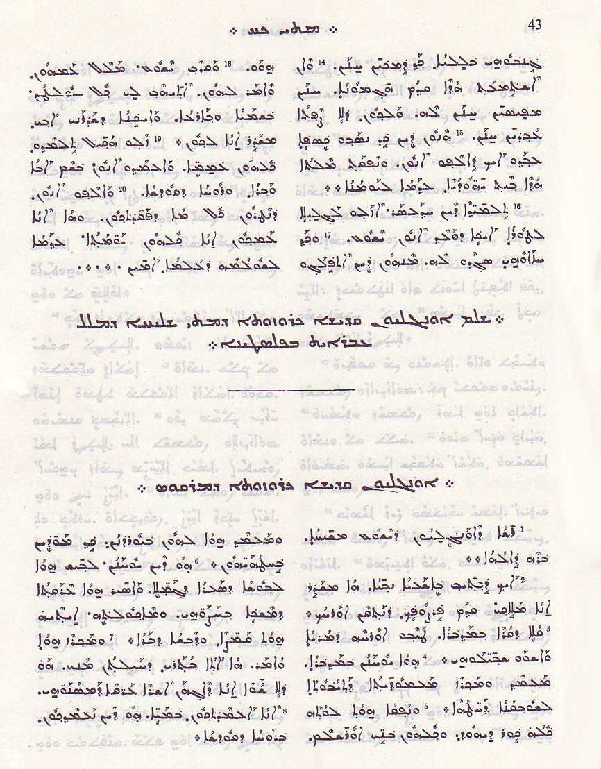 Ukázka kombinovaného užití písem Estrangelo a Serto s jakobitskou vokalizací Mt-Mk syrské Bible UBS 1979/1996